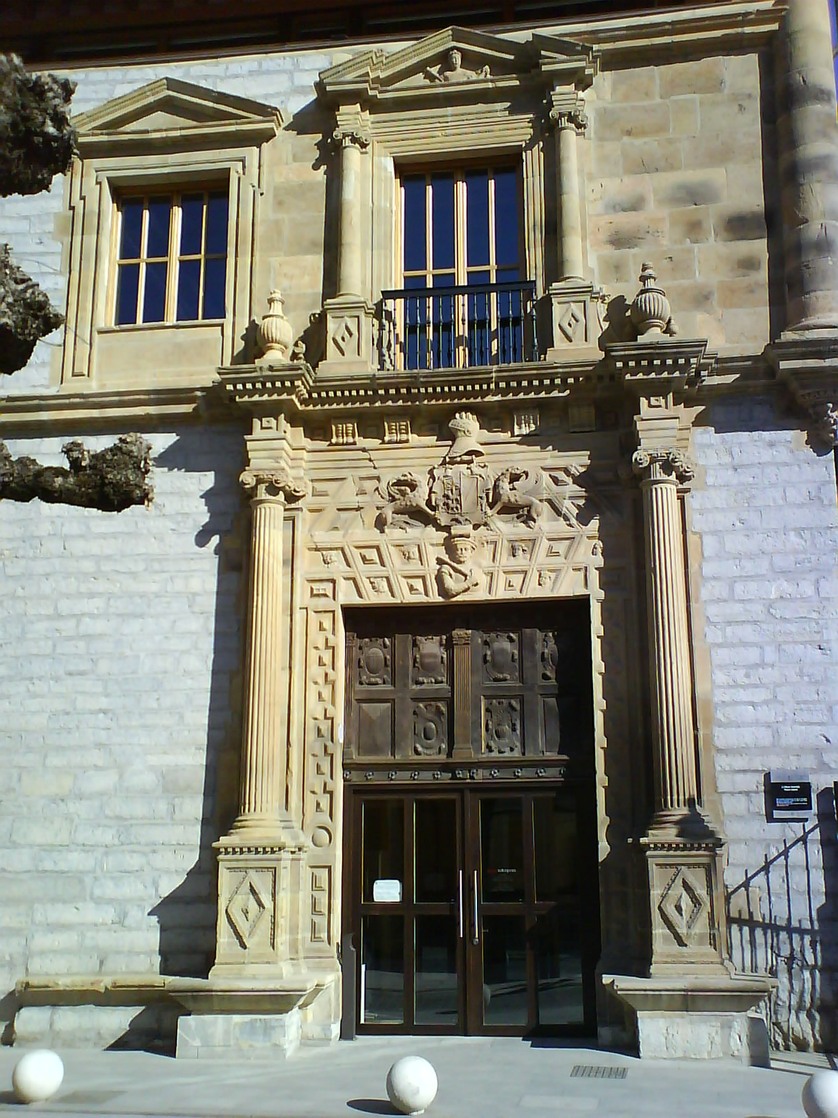 Palacio Lobiano de Ermua, Vizcaya, País Vasco, España.